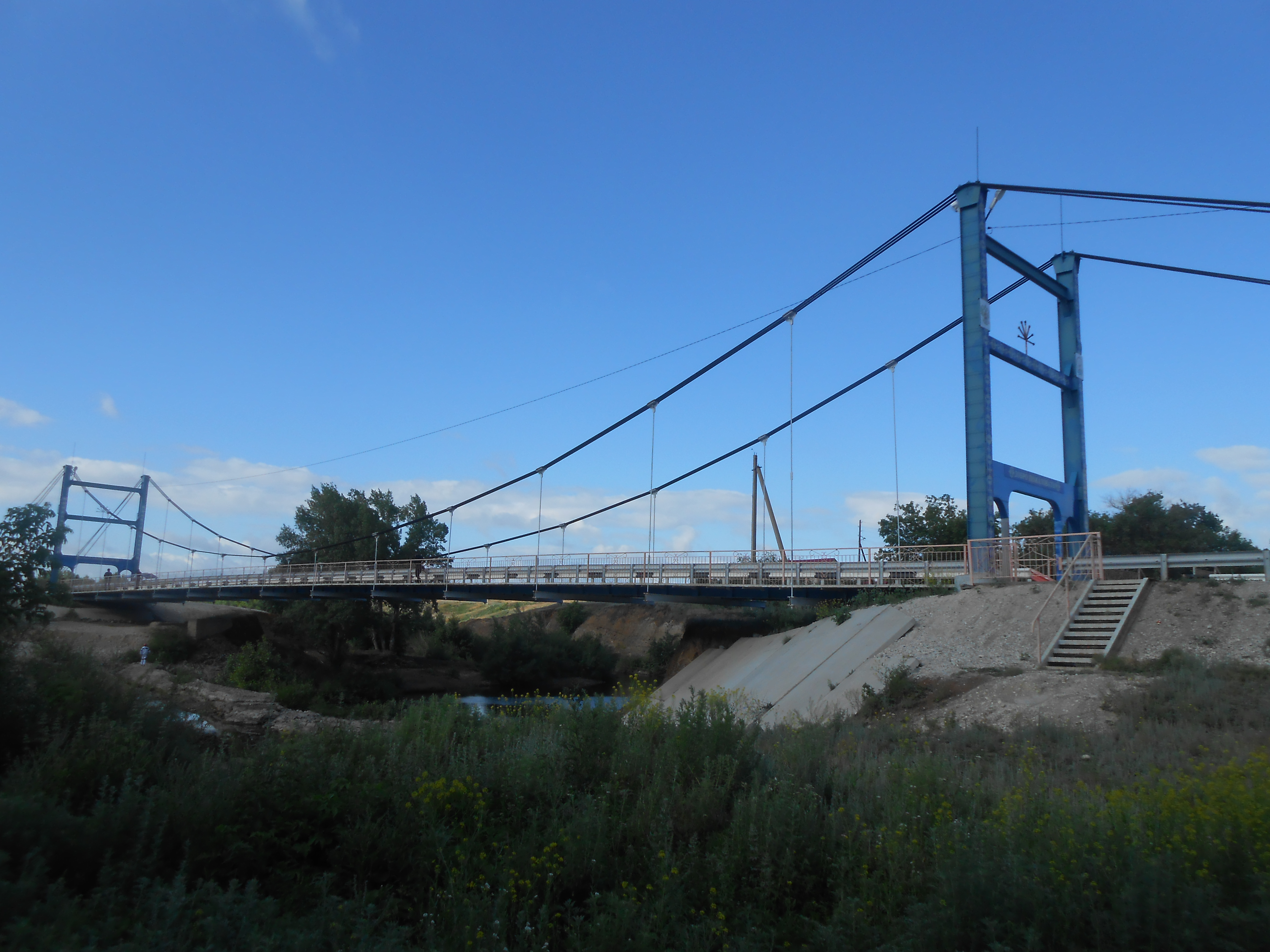 Мост между Татыр-Узяком и Бурибаем через р.Таналык